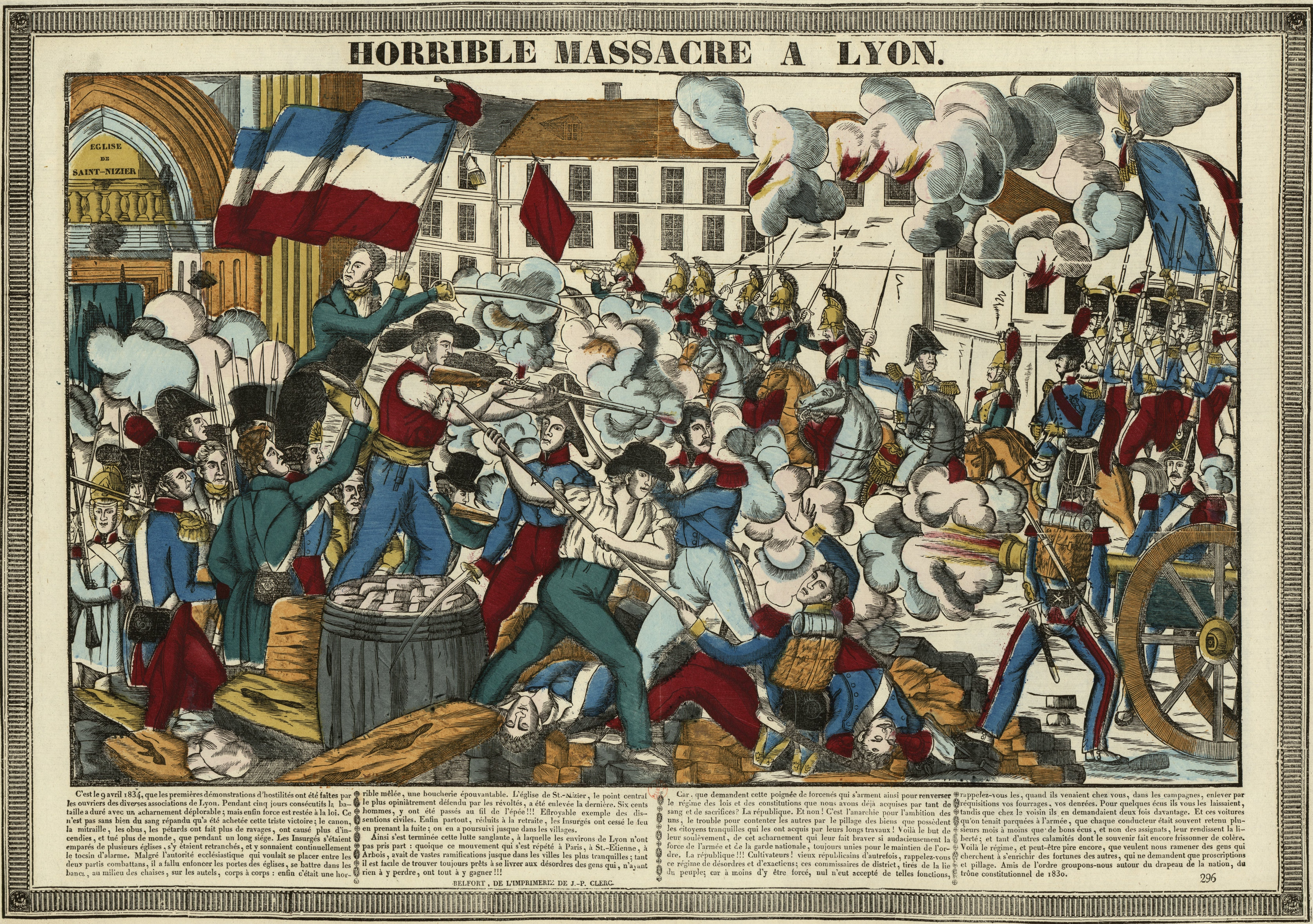 Horrible Massacre à Lyon en 1834.